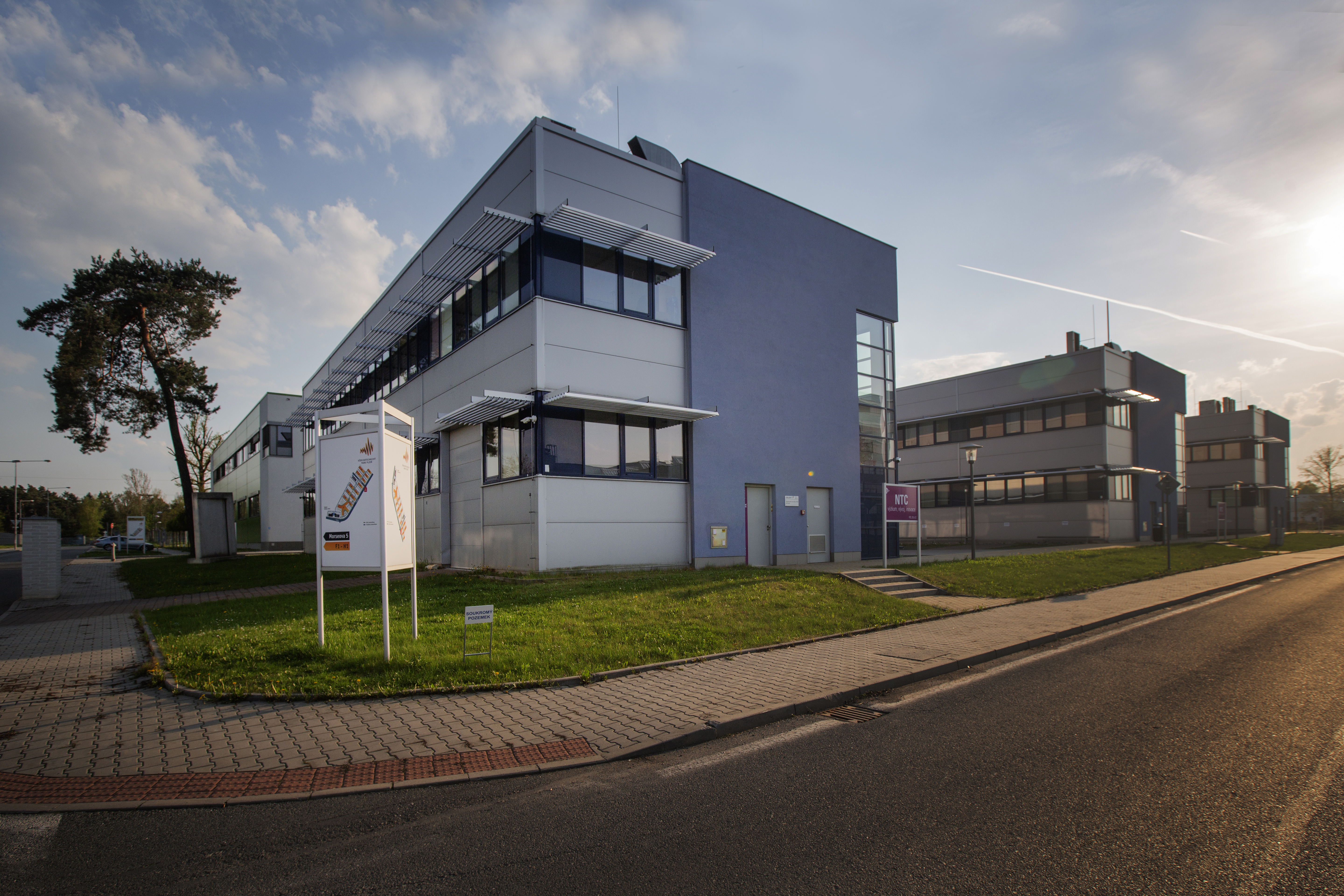 Budova NTC